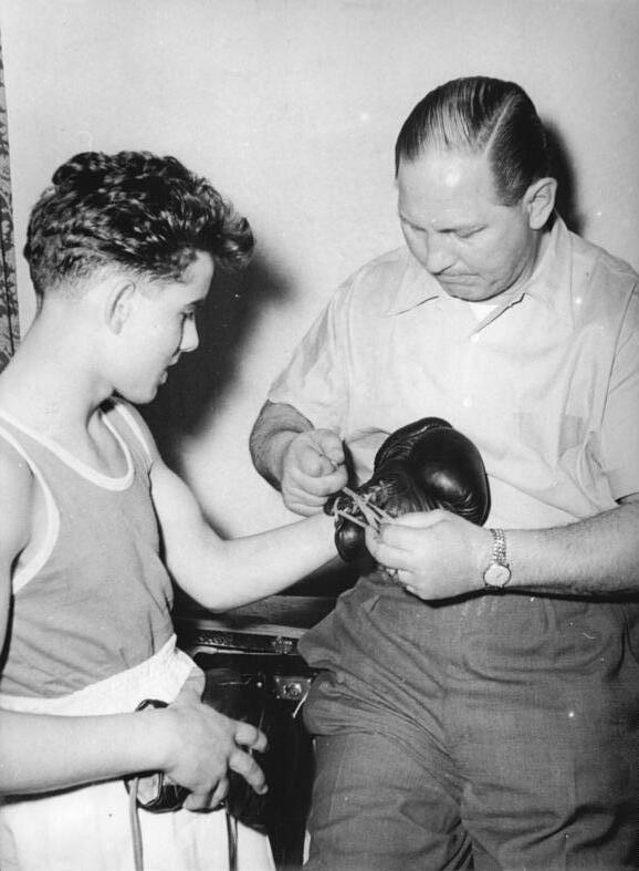 Behrendt, Kölblin Zentralbild Funck 30.4.1955 Box-Länderkampf Österreich-DDR in Berlin. In der Berliner Werner-Seelenbinder-Halle fand am 29.4.1955 der Box-Länderkampf zwischen Österreich und der DDR statt. Die Österreicher enttäuschten etwas und bildeten kurz vor den Europameisterschaften nicht den erwarteten harten Prüfstein. Sie unterlagen mit 19:1. UBz:Trainer Kölblin bindet dem Berliner Fliegengewichtler Behrendt die Handschuhe zu.